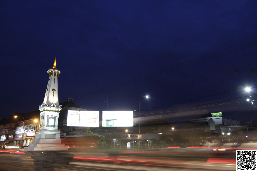 Tugu Golong Gilig